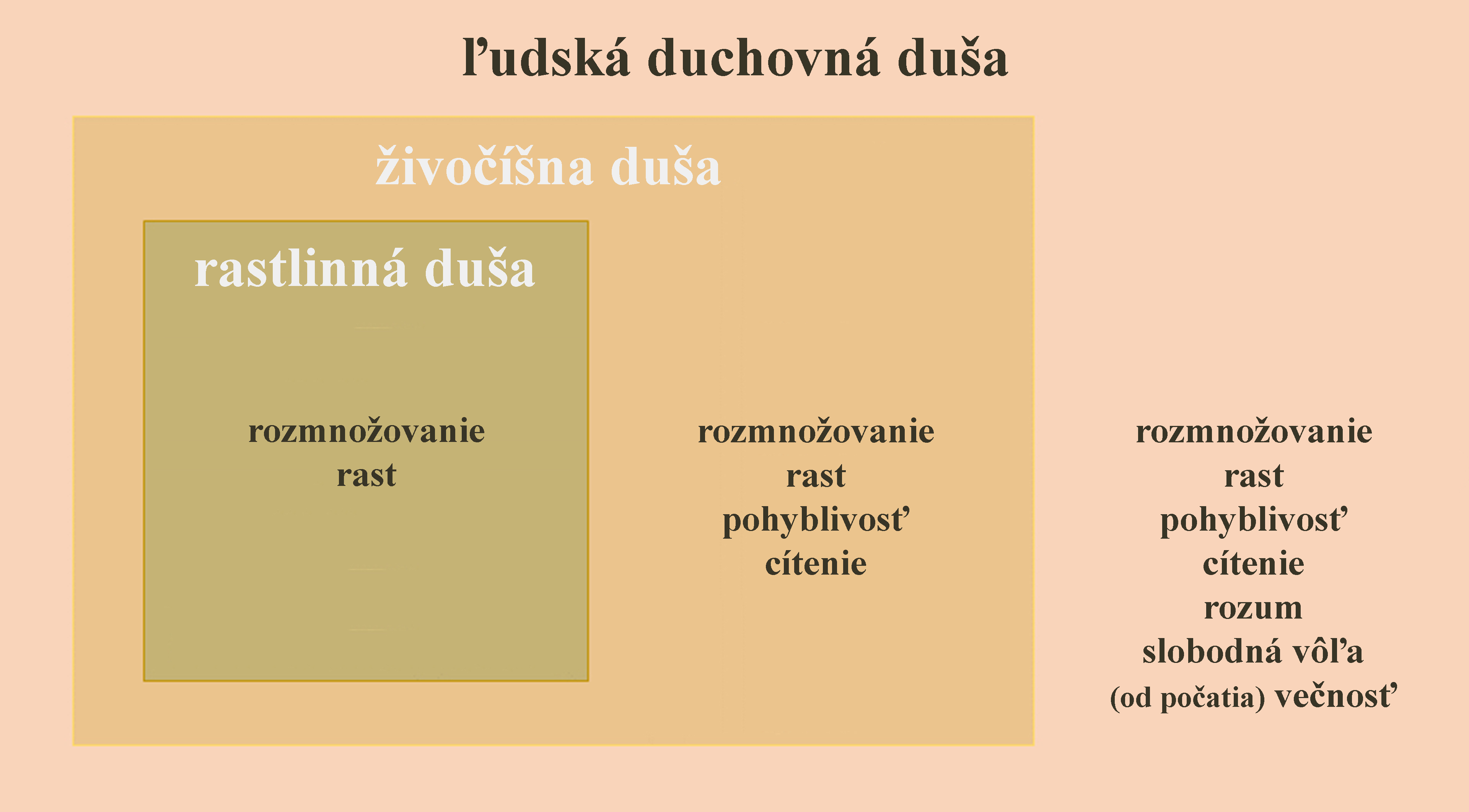 Rastlinná, zvieracia a ľudská duša podľa kresťanov